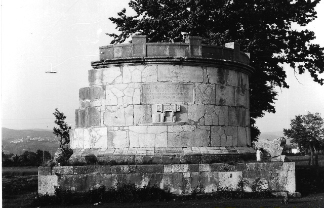 Area archeologica di Saepinum ad Altilia, frazione di Sepino (CB): il mausoleo di Ennio Marso.